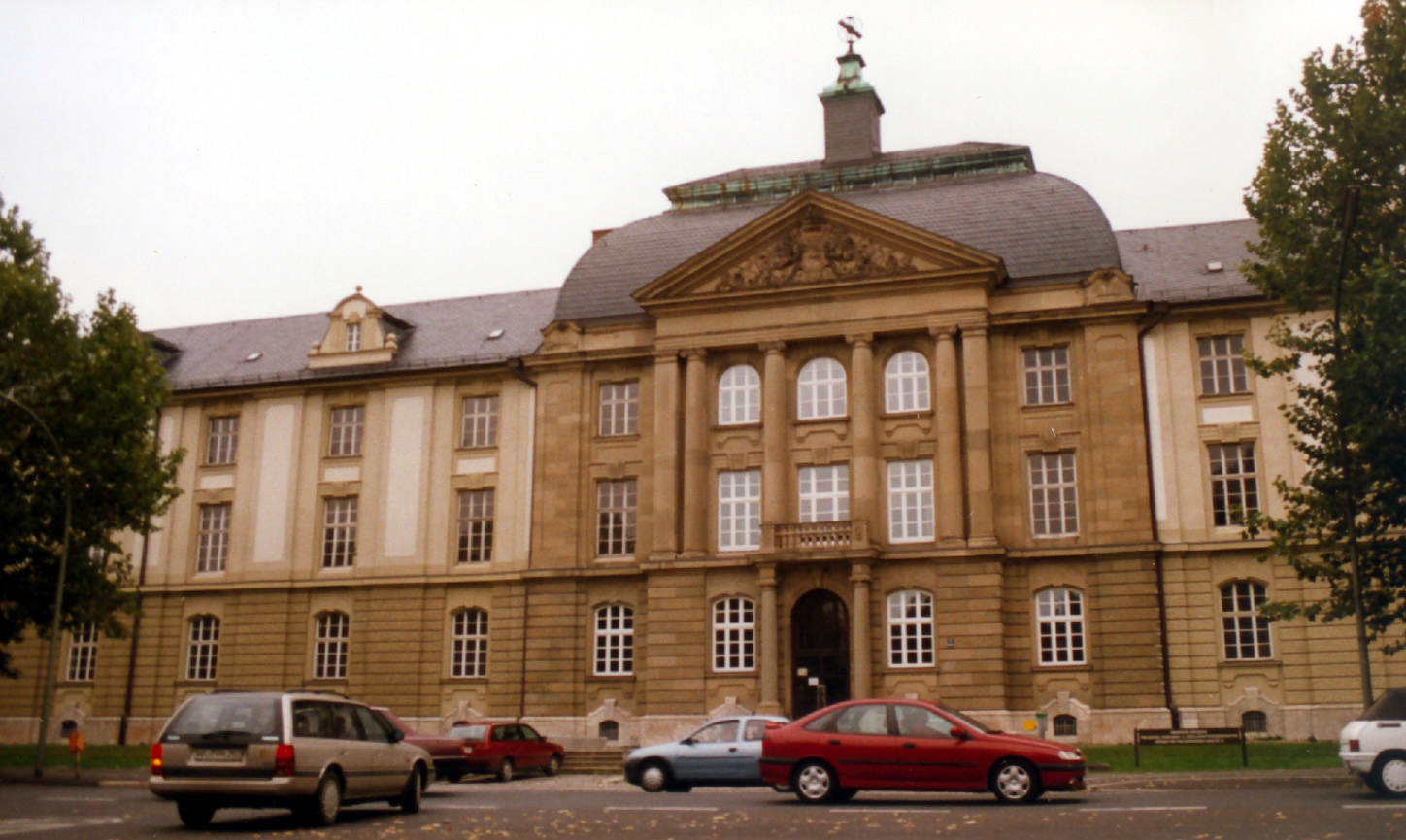 Institut für Pädagogik (Philosoph. Fakultät), Wuerzburg University, building at Wittelsbacherplatz